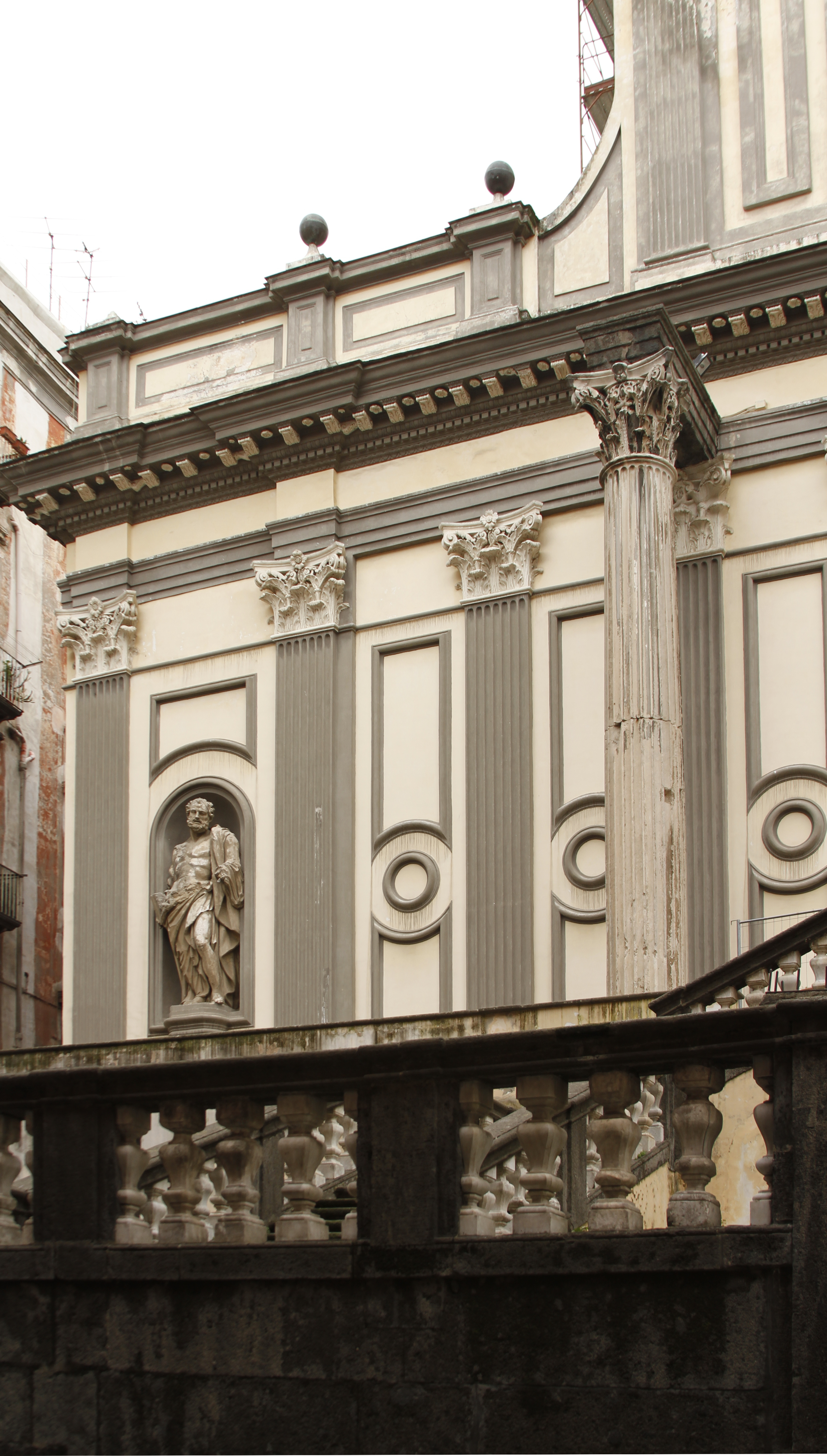 San Paolo Maggiore, Nápoles